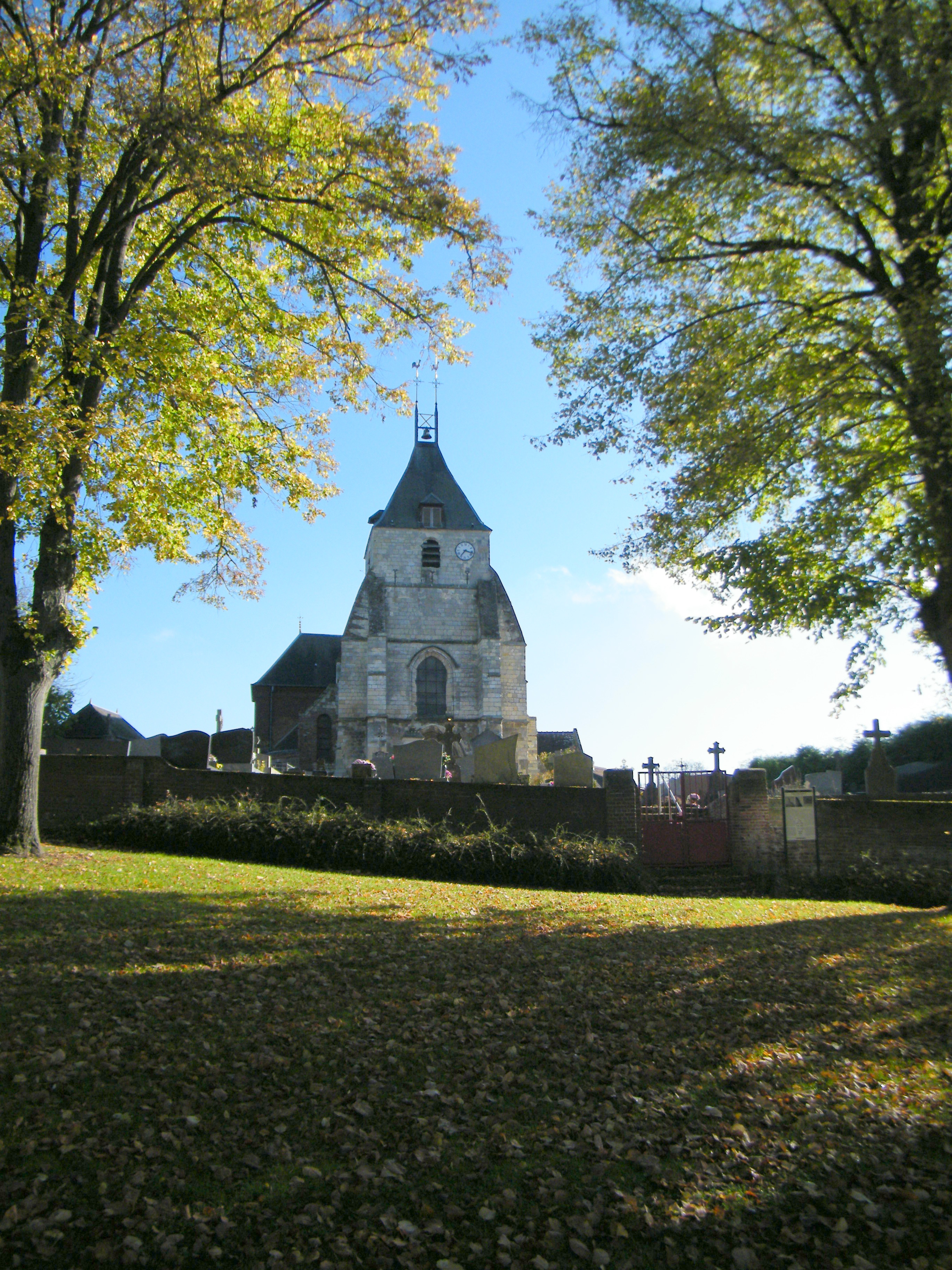 L'église.